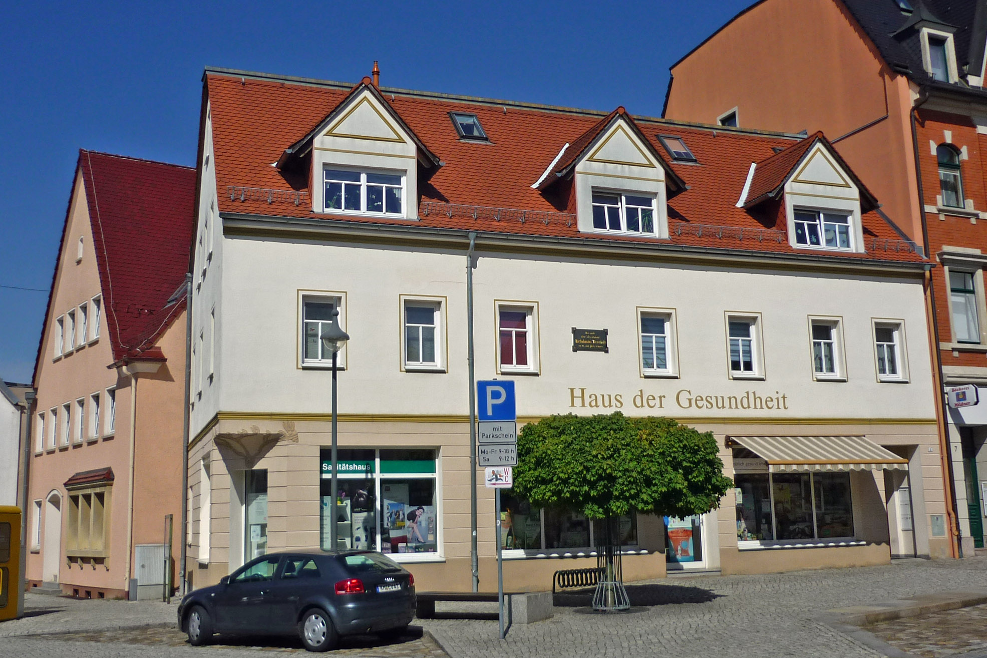 Pulsnitz, Geburtshaus von Bartholomäus Ziegenbalg